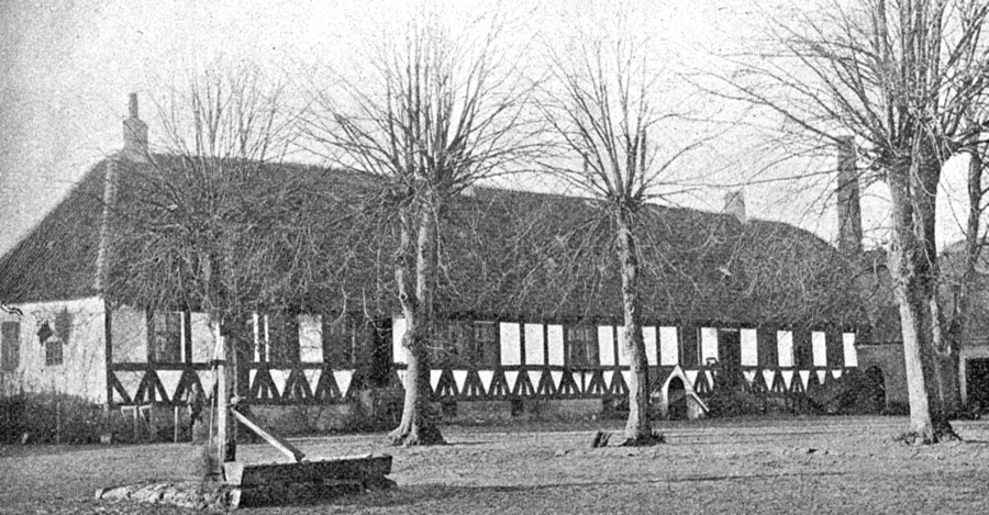 Lundegård er en hovedgård, som er dannet i 1577 af Erik Venstermand. Gården er helt i egebindingsværk og ligger i Nørre Broby Sogn, Sallinge Herred, Broby Kommune. Hovedbygningen er opført i 1702